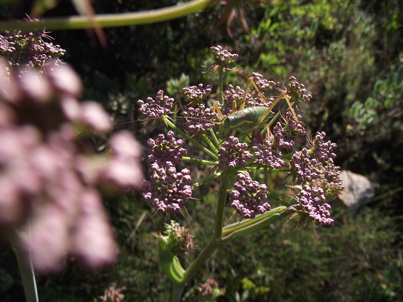 Sauterelle sur Peucedanum cervaria, ville de Draguignan